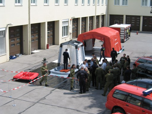 Übungsmäßiger Aufbau eines Deko-Platzes in der ehemaligen Landesfeuerwehrschule Tulln